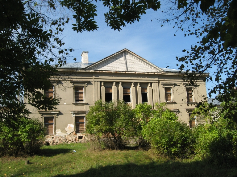 Паланечка. Палац